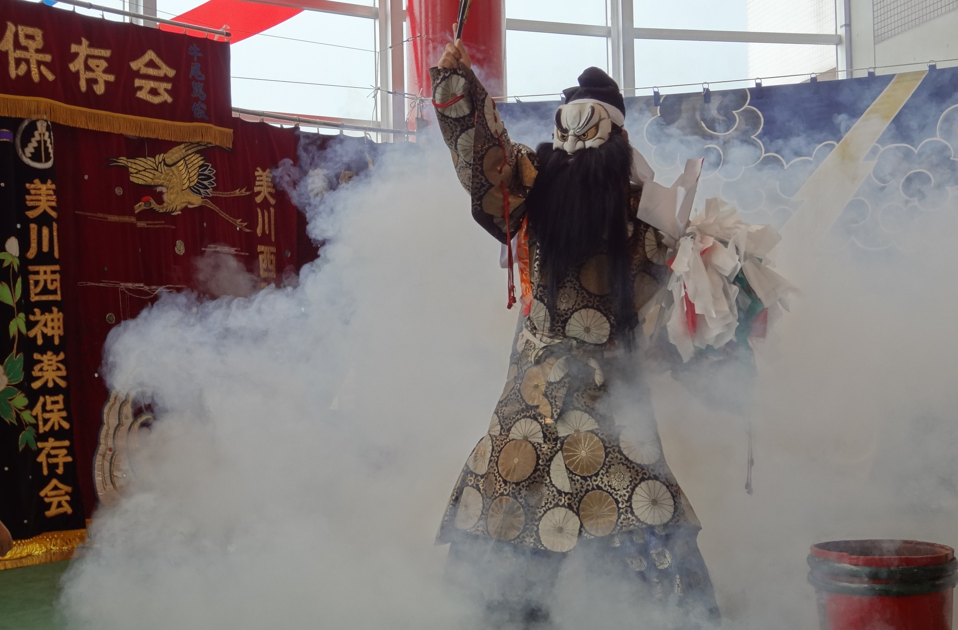 石見神楽・演目「大蛇（おろち）」に登場するスサノオ。美川西神楽保存会（島根県浜田市）